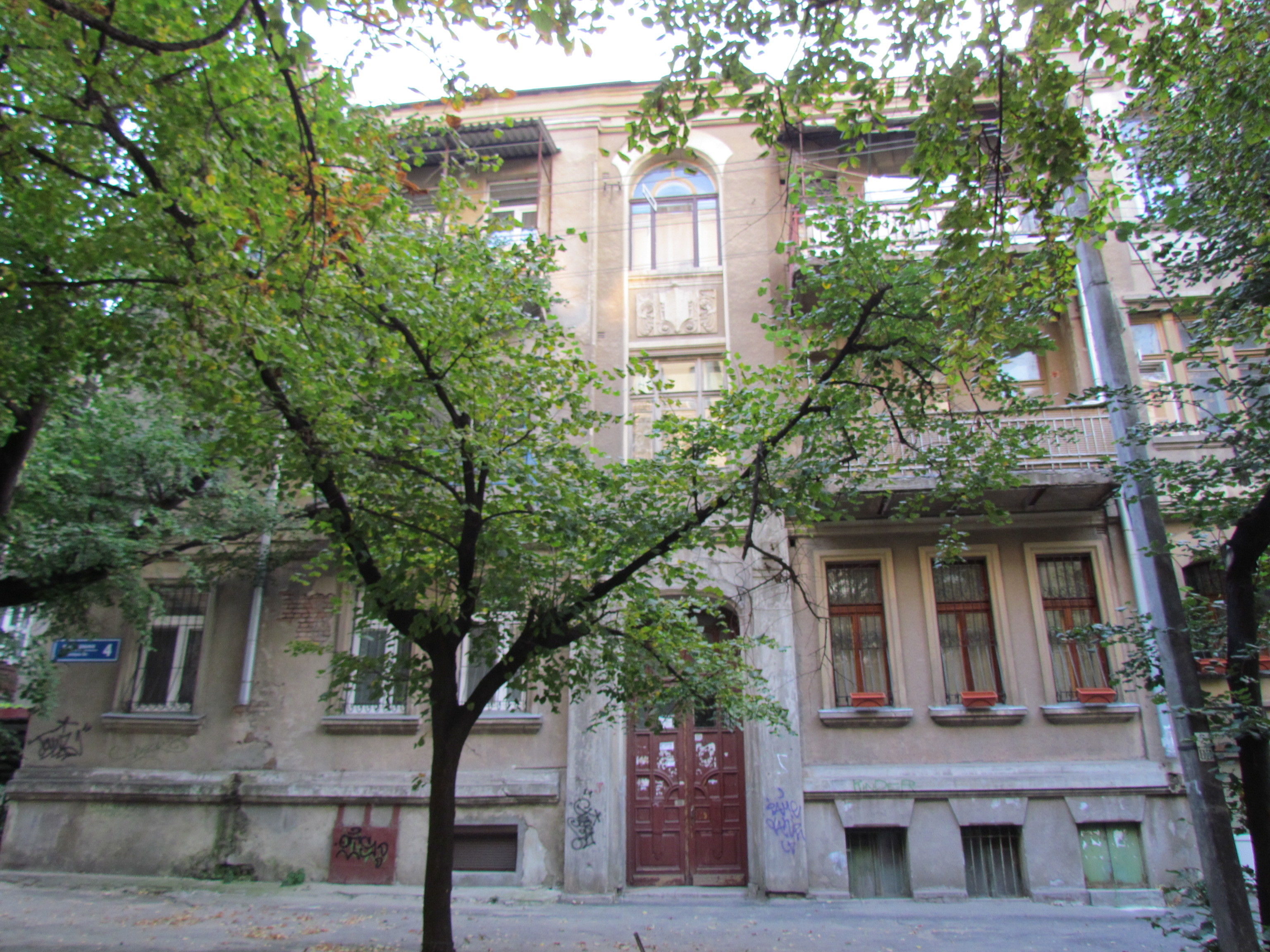 Україна, Харків, вул. Гаршина, 4